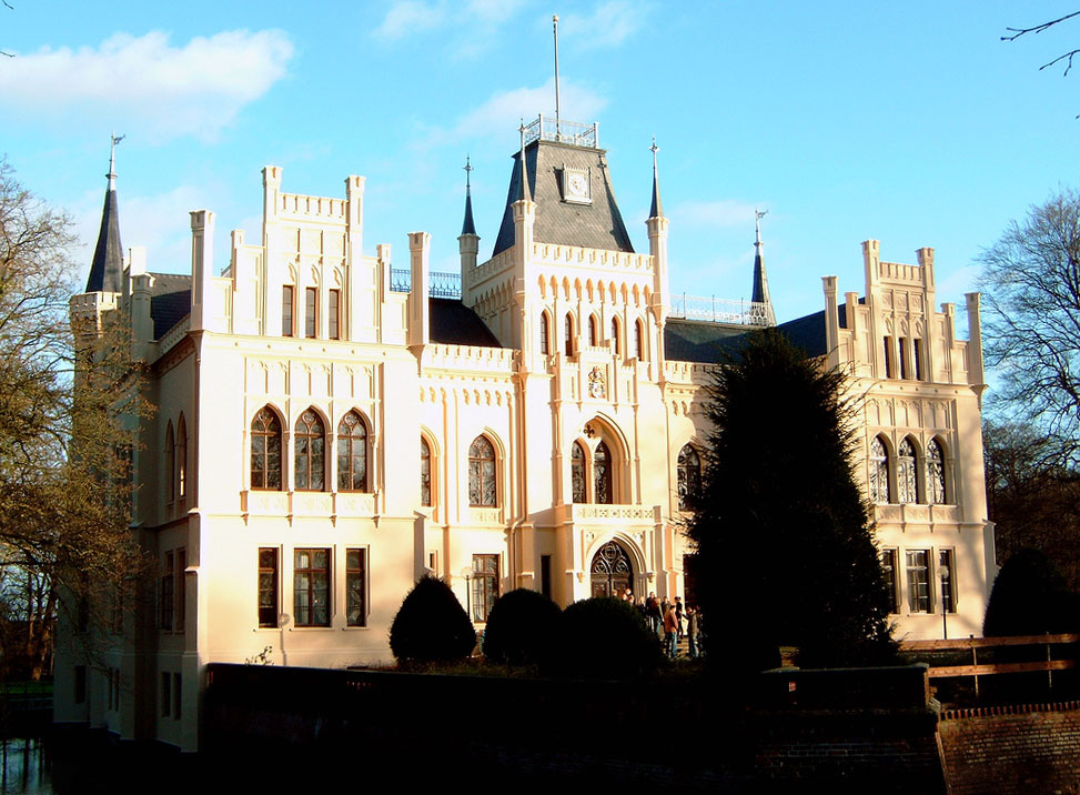 Die Evenburg in Leer, Ostfriesland, Stadtteil Loga nach der Renovierung im neugotischen Stil.